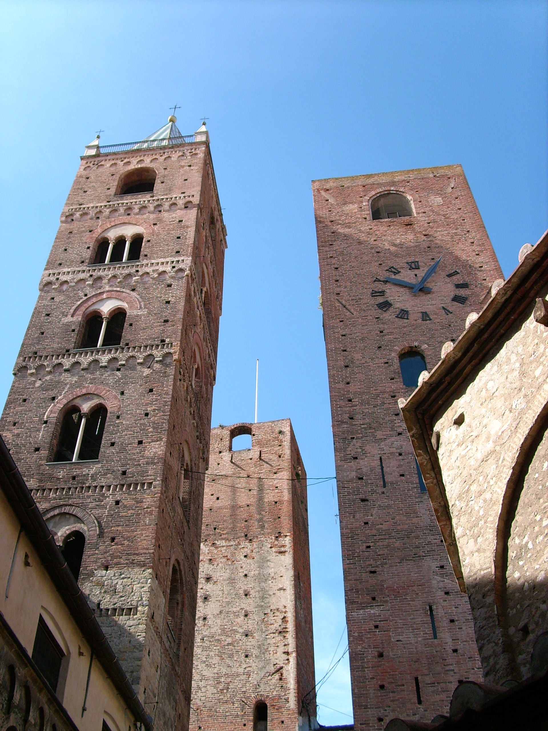 Centro storico di Albenga, Liguria, Italia